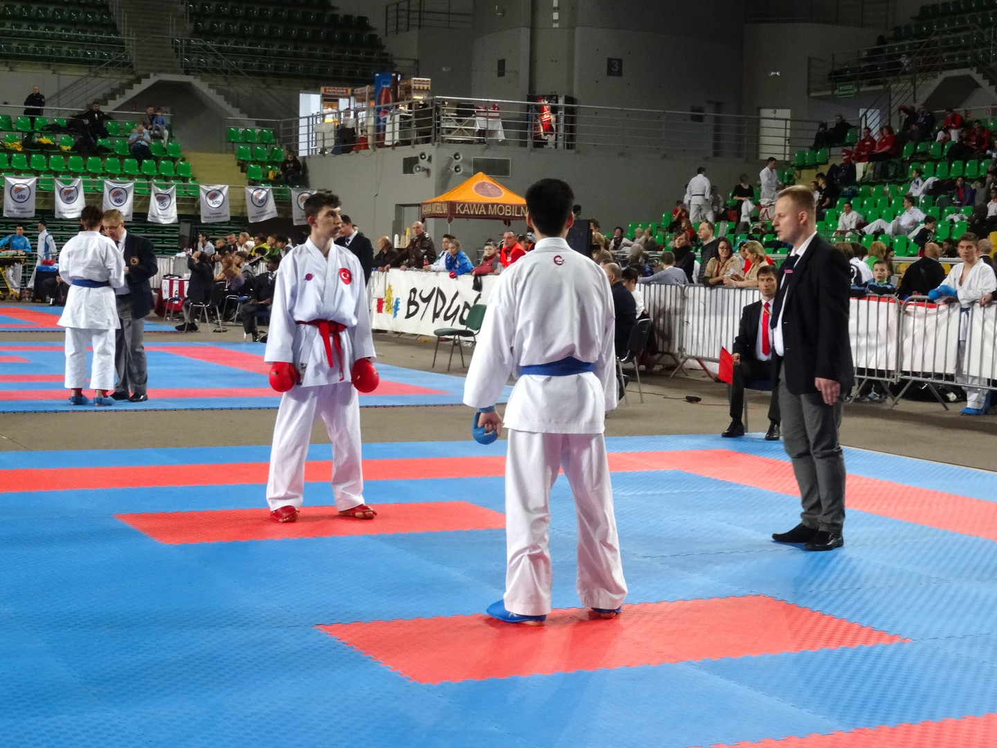 Mistrzostwa Świata Karate Shotokan w Bydgoszczy 1-3 kwietnia 2016 w hali Łuczniczka